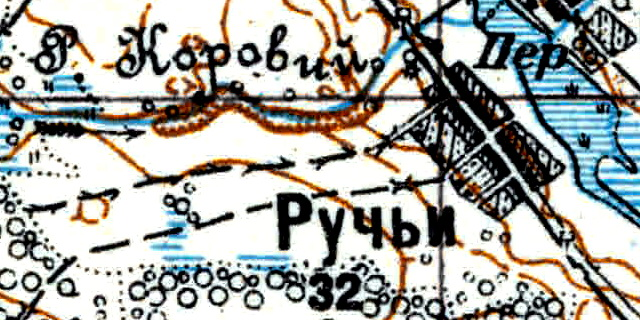 Топографическая карта Ленинградской области, квадрат Vc-29 (Батецкая), деревня Ручьи